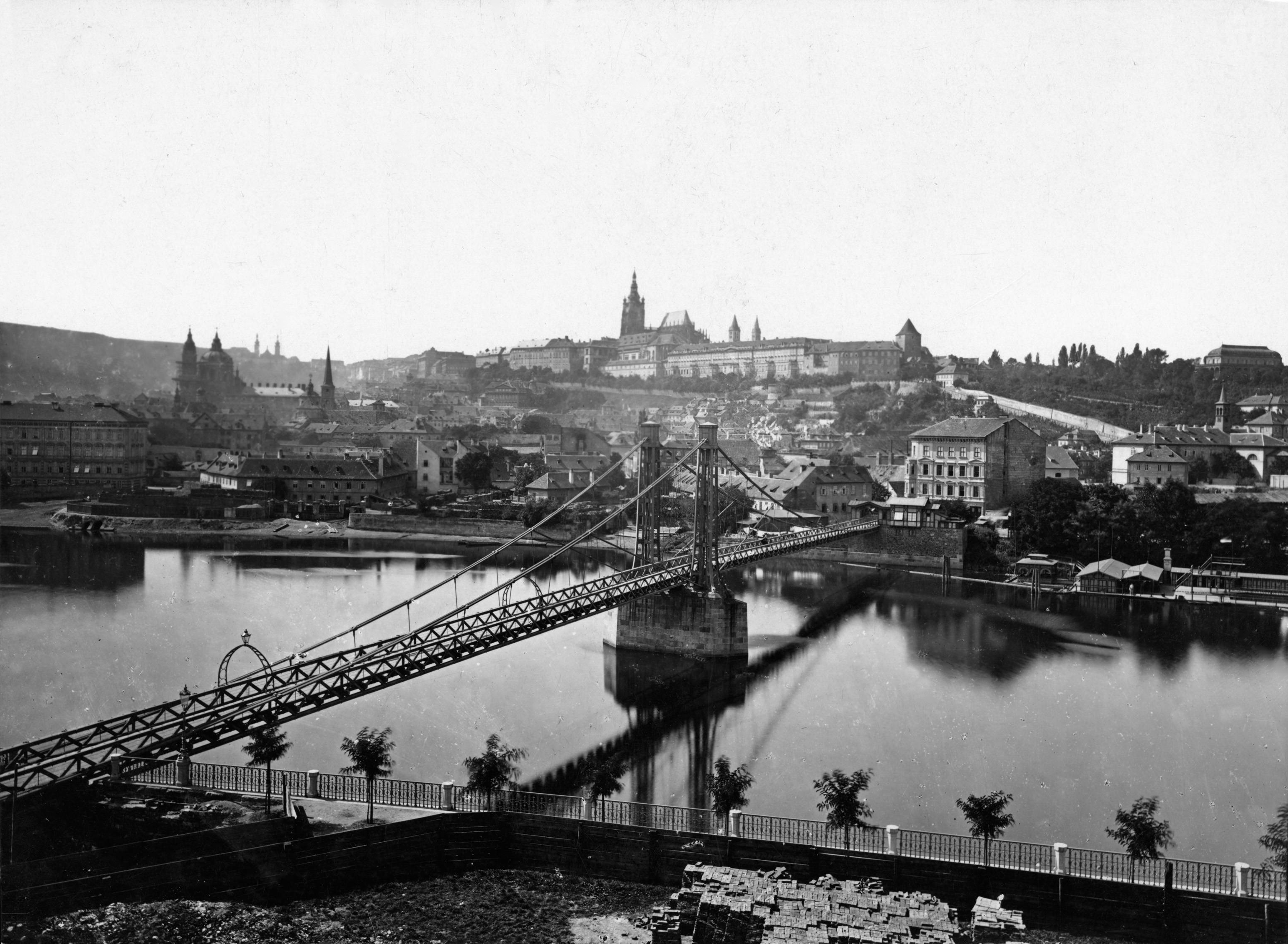 Pražský hrad a Rudolfova lávka